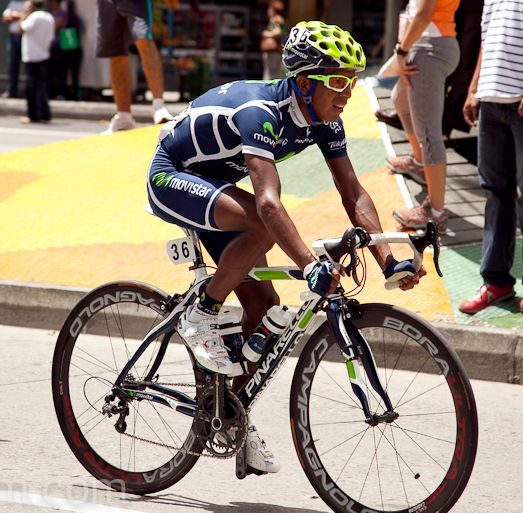 Oscar Soliz, ciclista boliviano del Movistar Team Continental en la Vuelta a Antioquia 2011